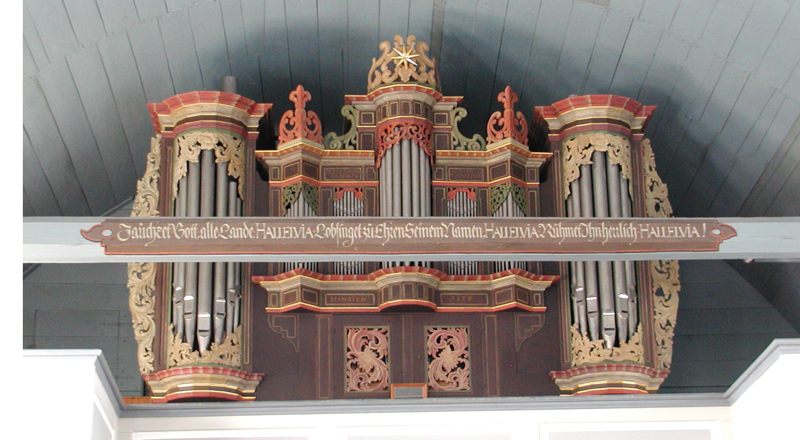 Die berühmte Arp-Schnitger-Orgel